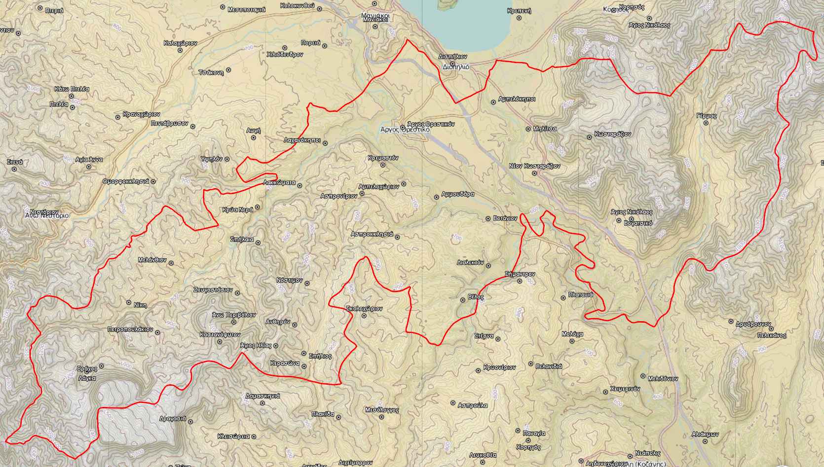 Τοπογραφικός χάρτης του Δήμου Ορεστίδος